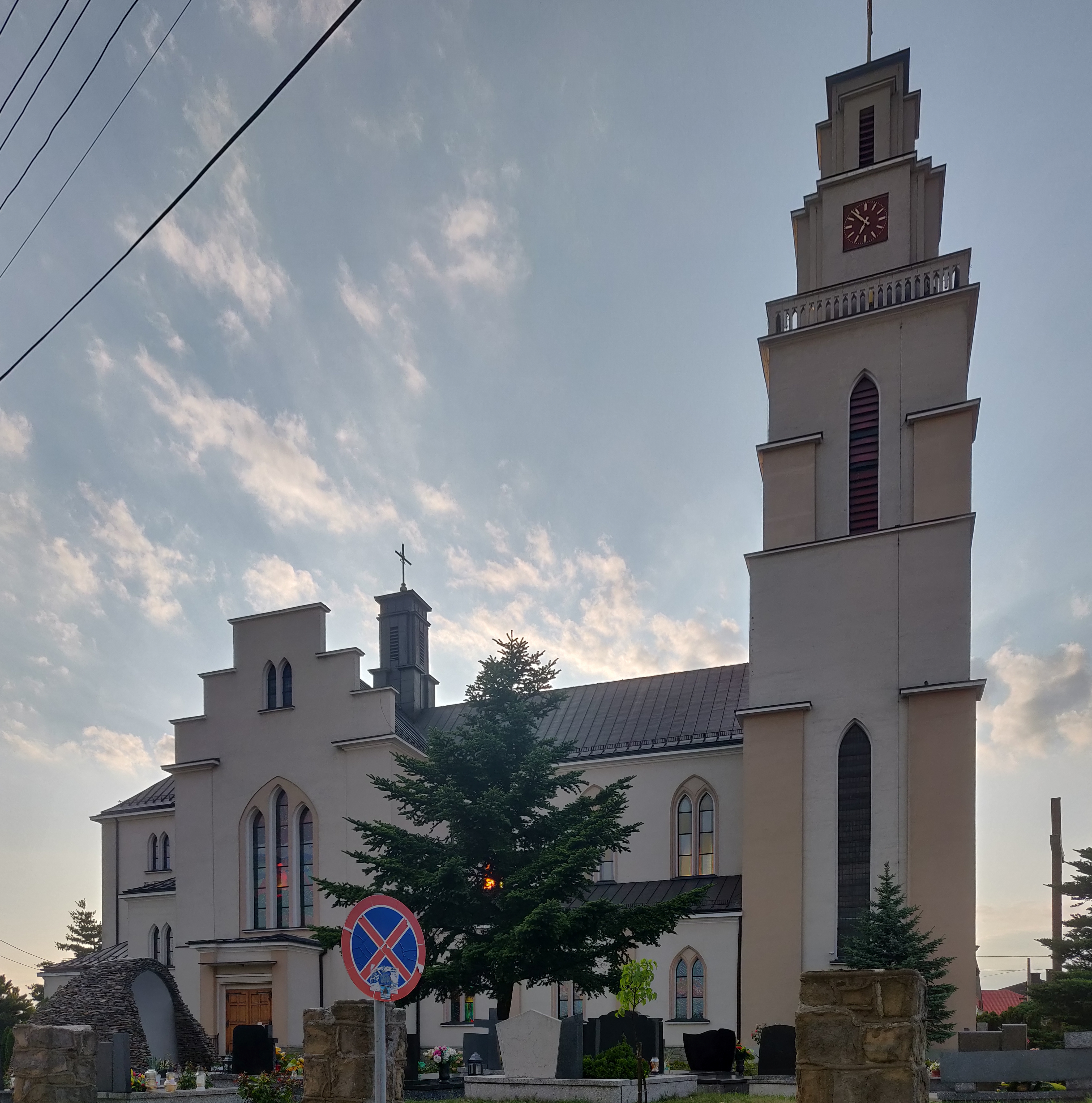 Kościół pw. Najświętszego Serca Pana Jezusa w Rogowie